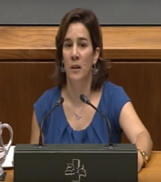 Leire-Pinedo